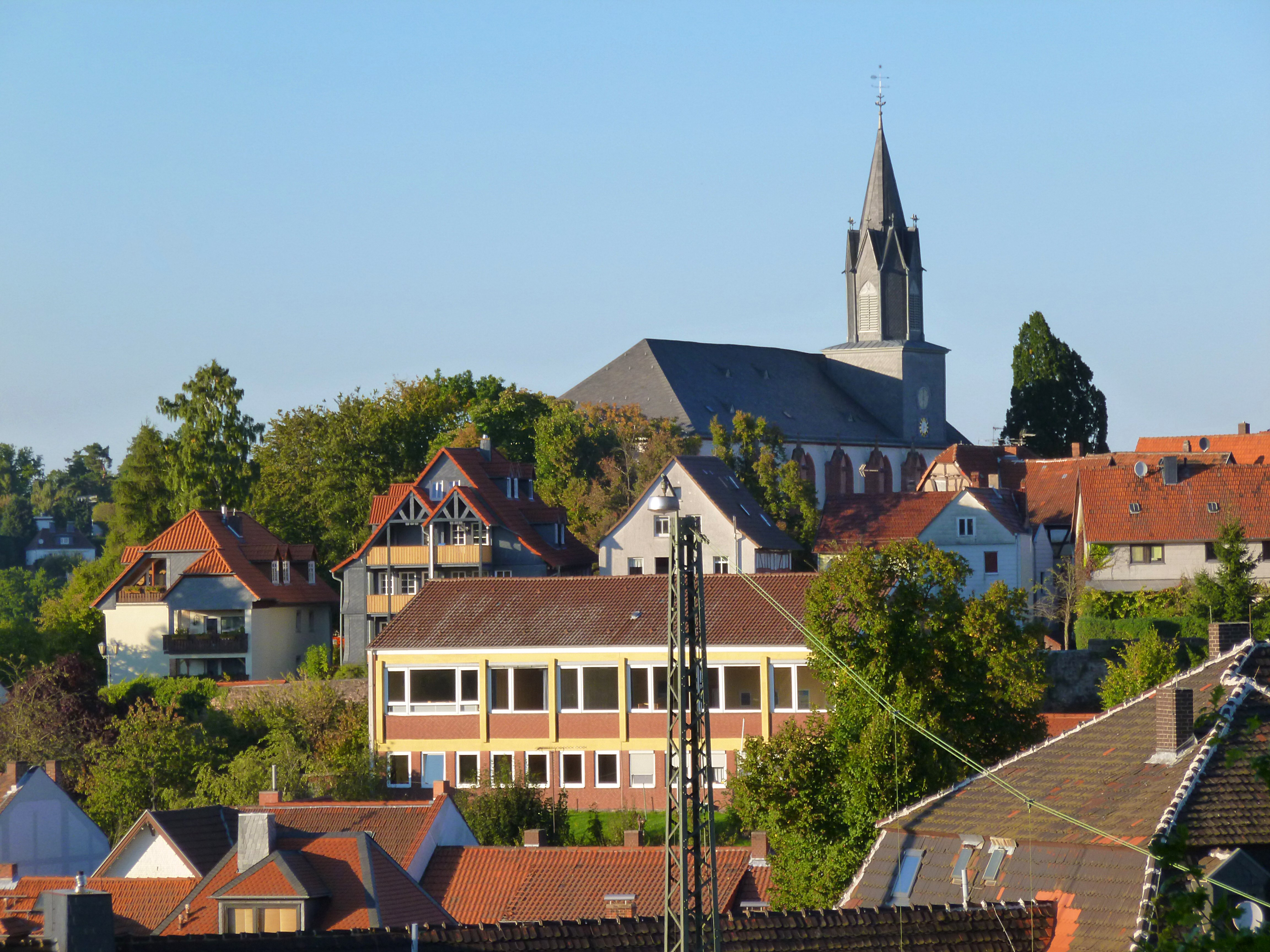 Die evangelische Stadtkirche in Treysa, Schwalmstadt (Hessen). Fotografiert von der gegenüberliegenden Seite des Bahnhofs Treysa (Ulrichsweg). Aufgenommen an einem sonnigen Herbsttag.